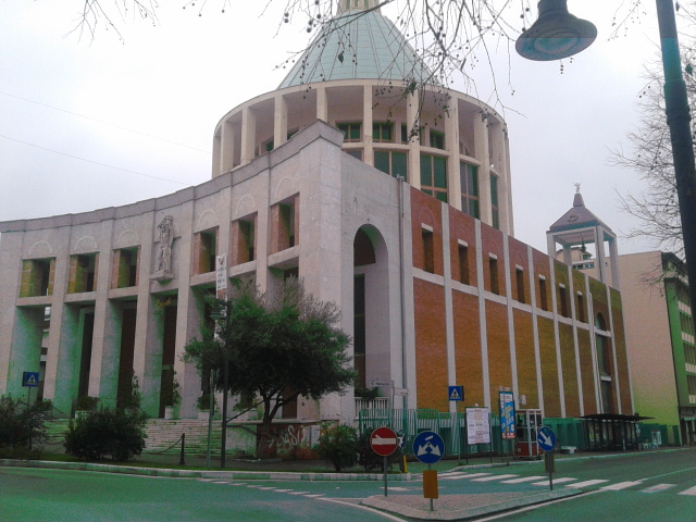 Chiesa di San Sebastiano, Massa. Veduta laterale